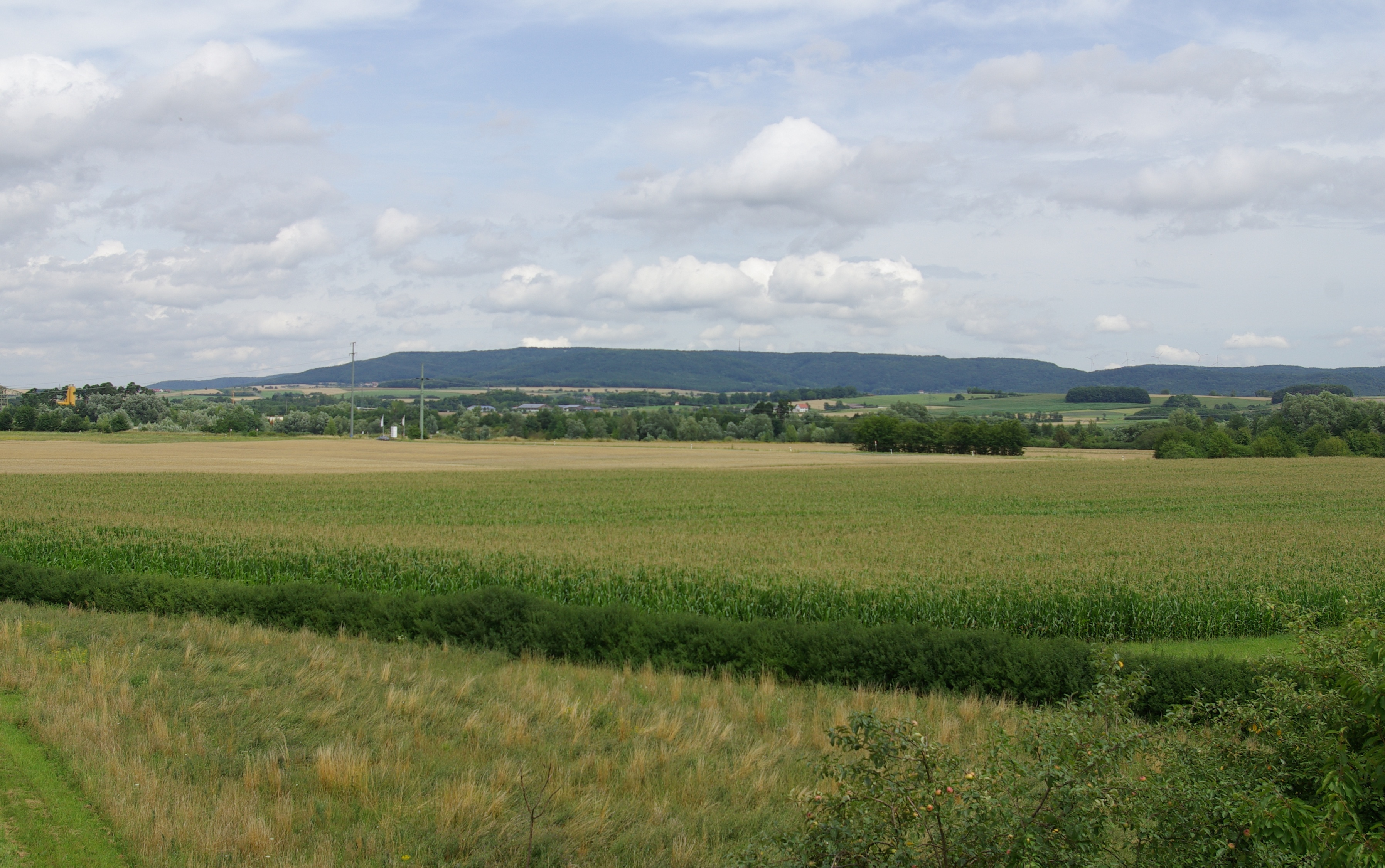 Blick von Neuses an der Regnitz nach Norden zur Friesener Warte (561,7 m ü. NN).